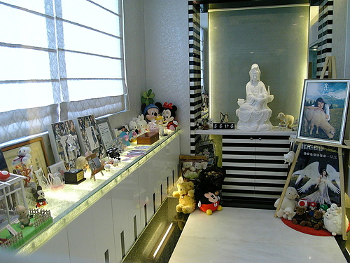 福田妙國生命紀念館蛋蛋妙居，是許瑋倫長眠處。